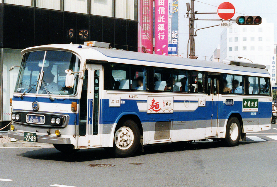 中国JRバス 三菱ふそう MS512N 富士重 13型